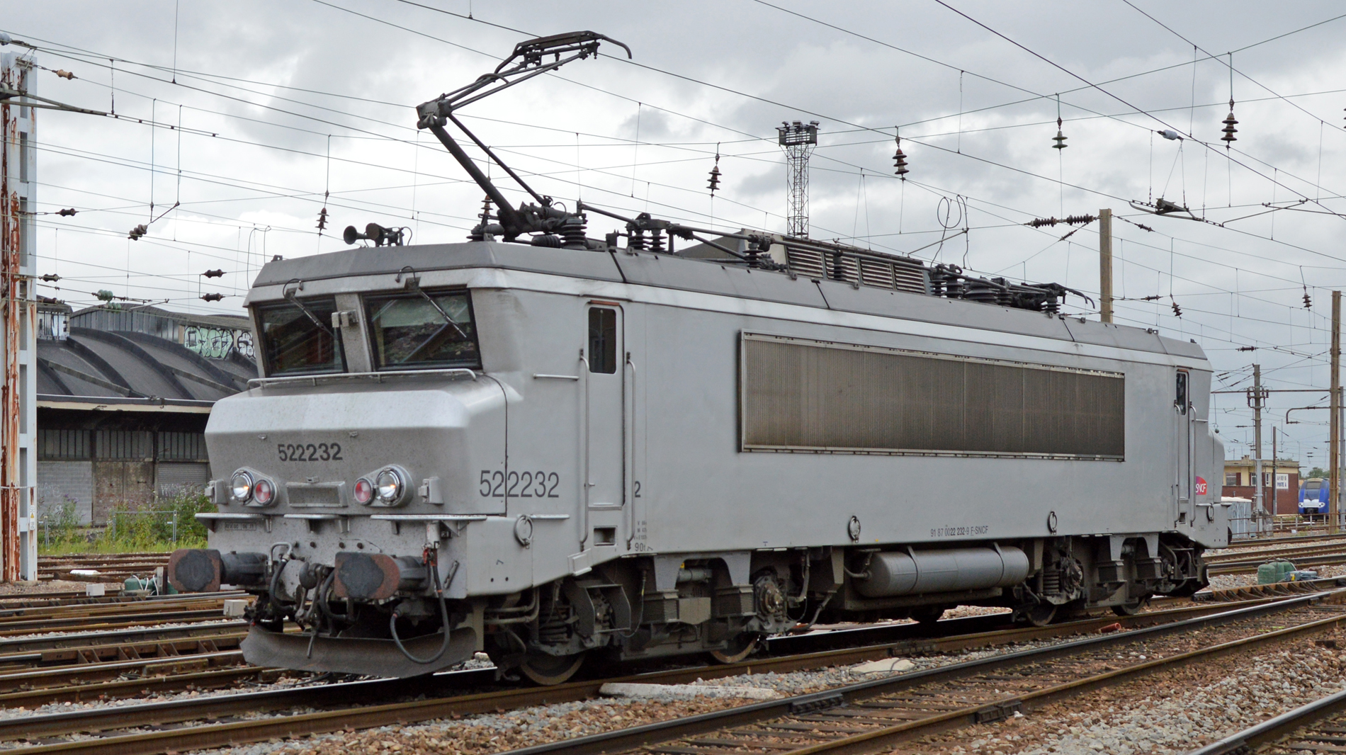 BB 22232 à Amiens